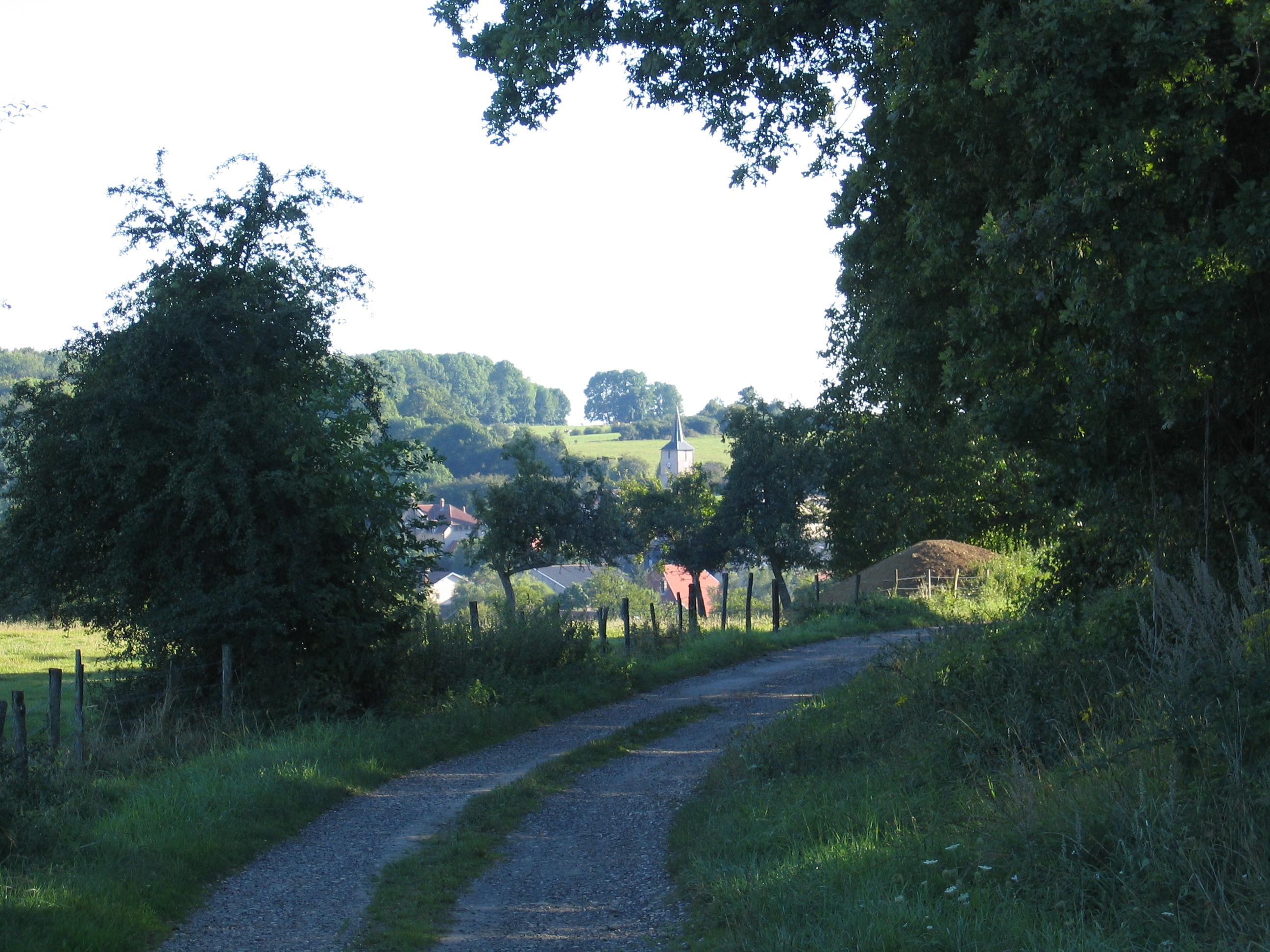 Repaix (Lorraine)